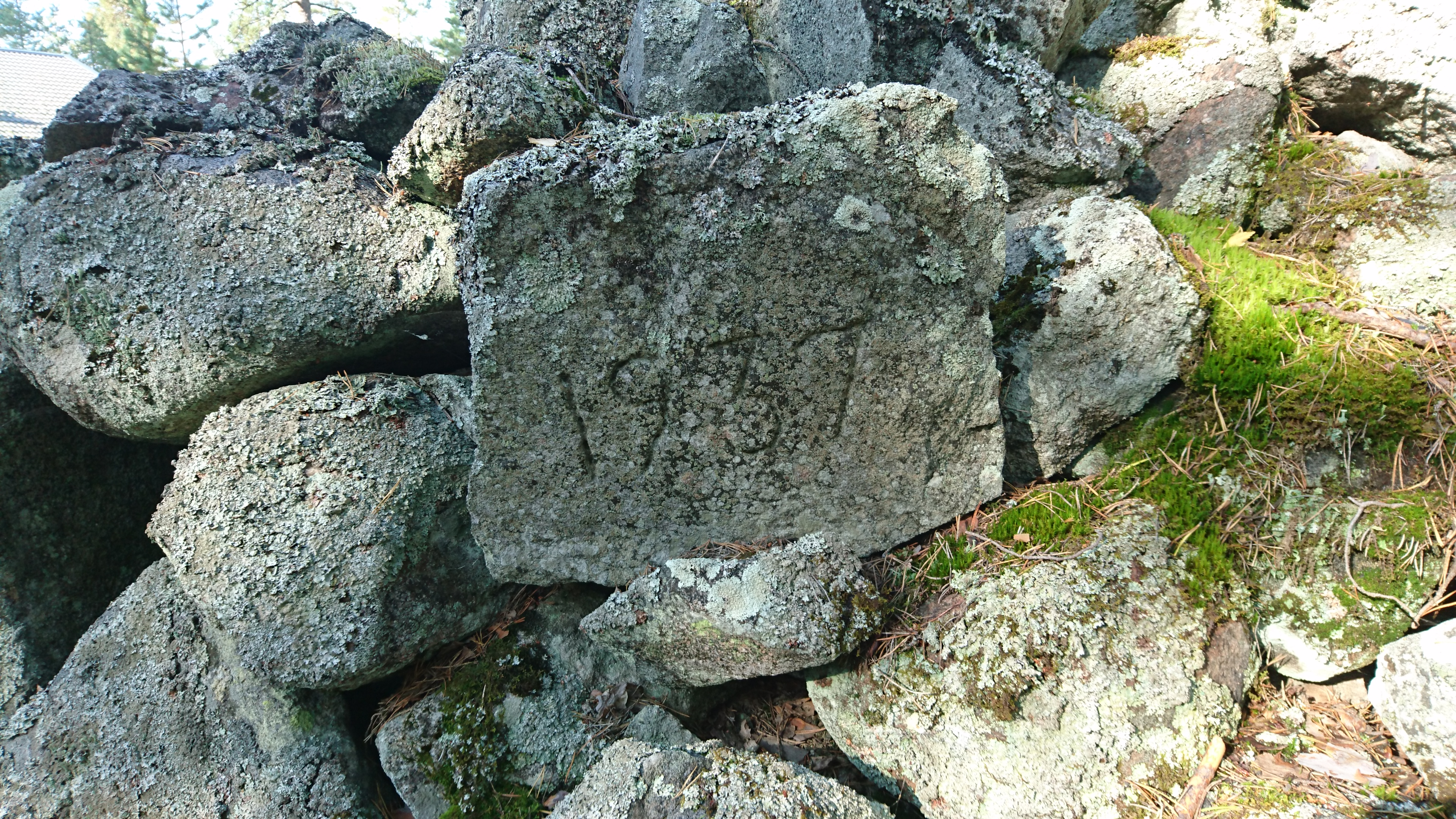 Opinsaunan kiuas; muistomerkki Jyväskylässä